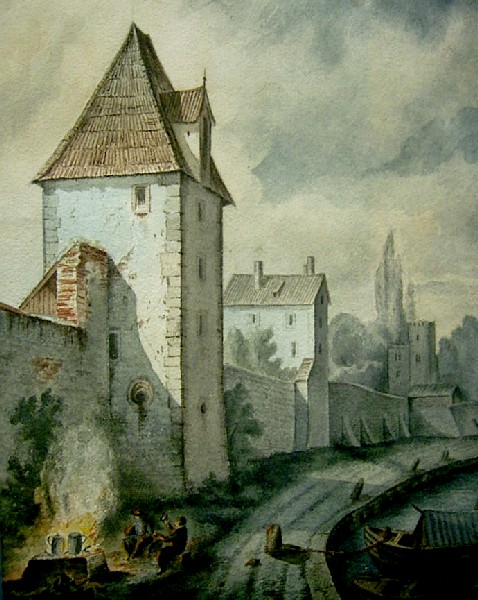 Regensburger Schiffslände, Aquarell, 28 x 23 cm